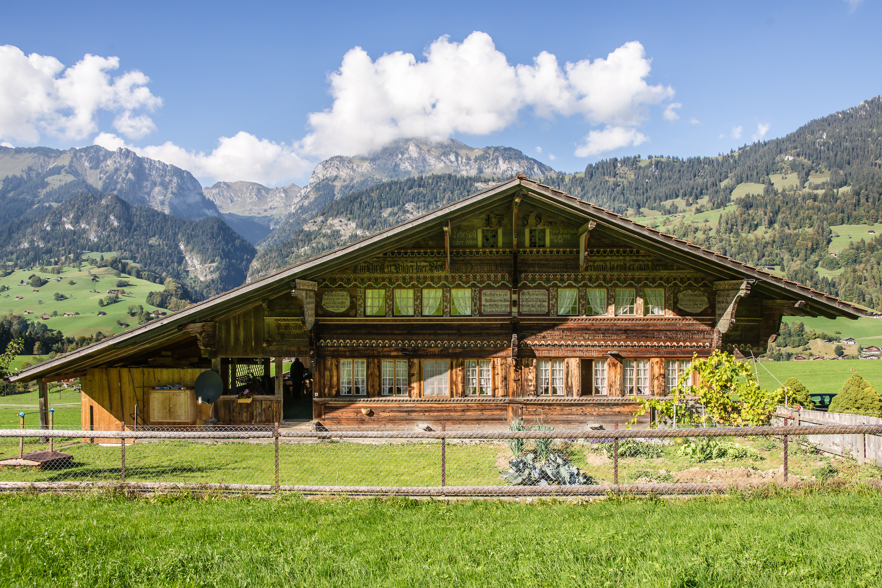 Bauernhaus Argel, Totalansicht Südseite